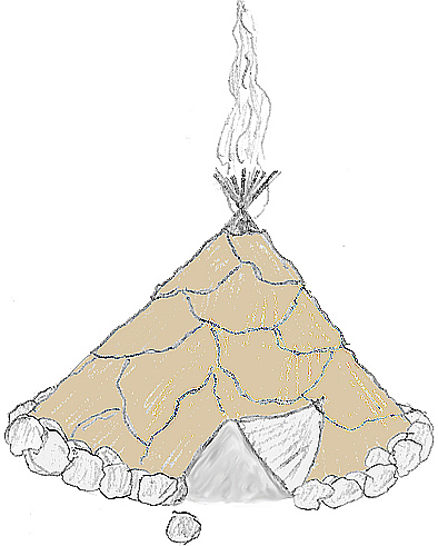 Skinntelt